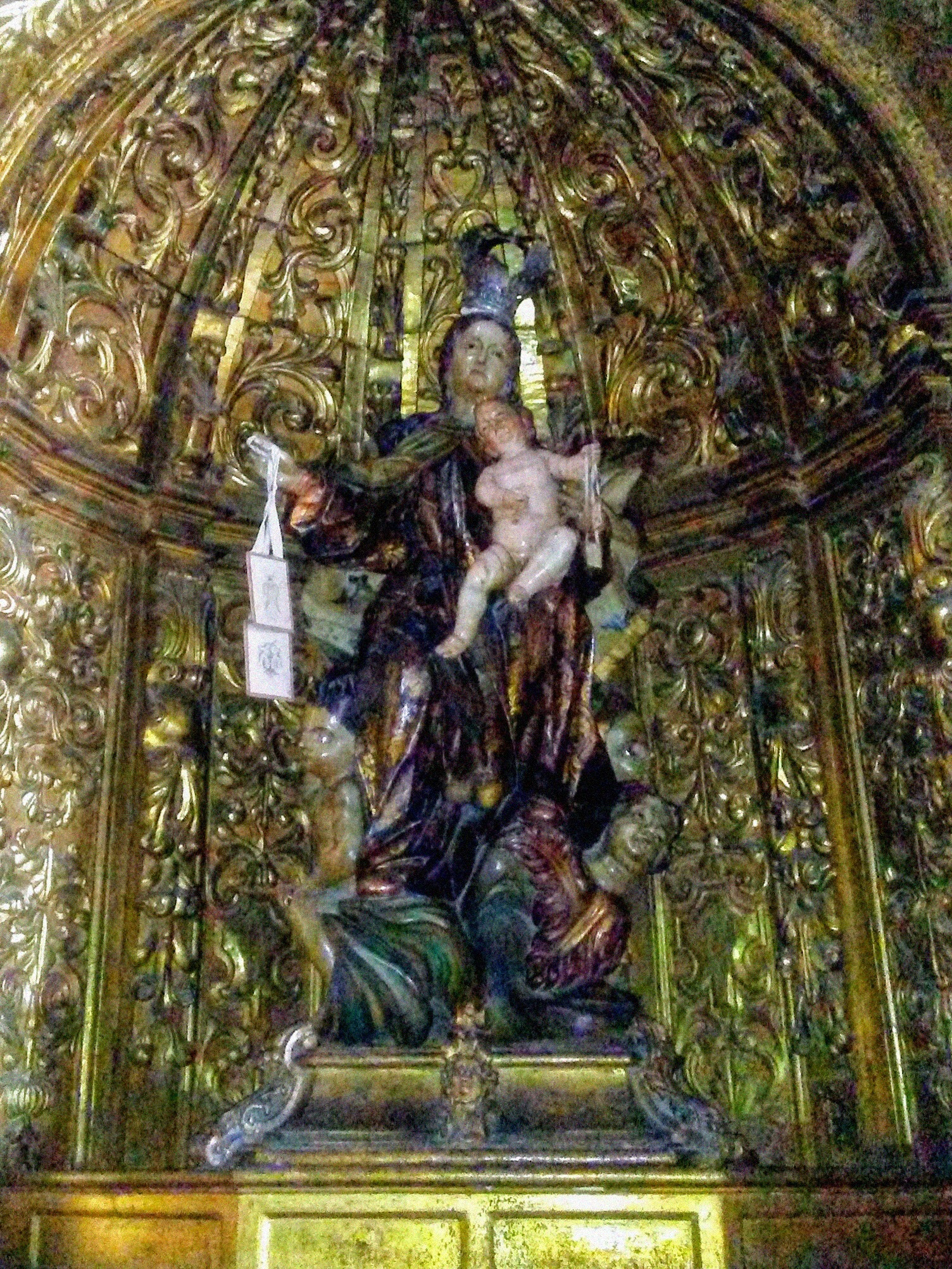 Virgen del Carmen (Catedral de Orense)